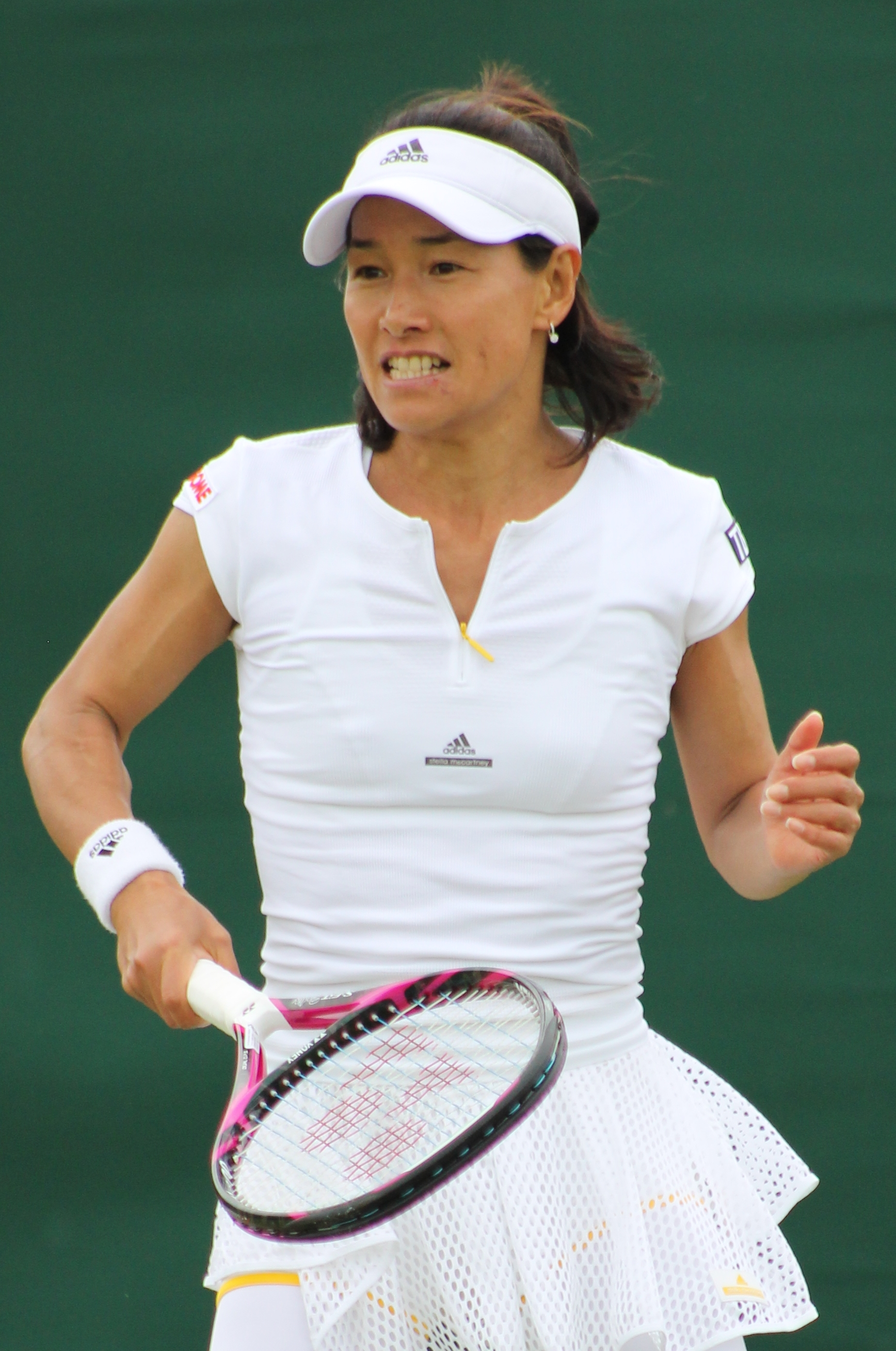 Date Krumm WMQ15 (6)